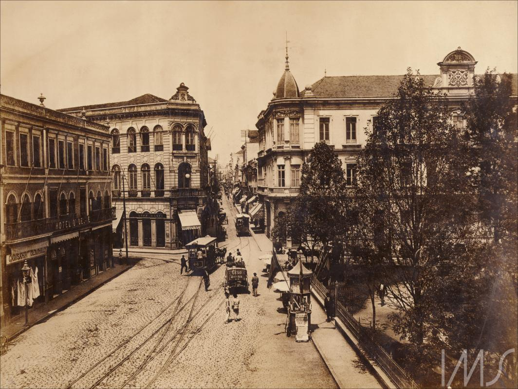 Álbum Fotografias de São Paulo 1900 - Largo e rua São Bento Gaensly, Guilherme Data: 1890 décad Descrição: P&B i. 17 X 22,7 cm; s.p. 17,5 X 23,2 cm; s.s. 24,5 X 33 cm (álbum) Gelatina/ Prata Assuntos: Casa Medifer Ruas Localidade: São Paulo Centro SP Brasil Fonte: Mestres do Séc. XIX